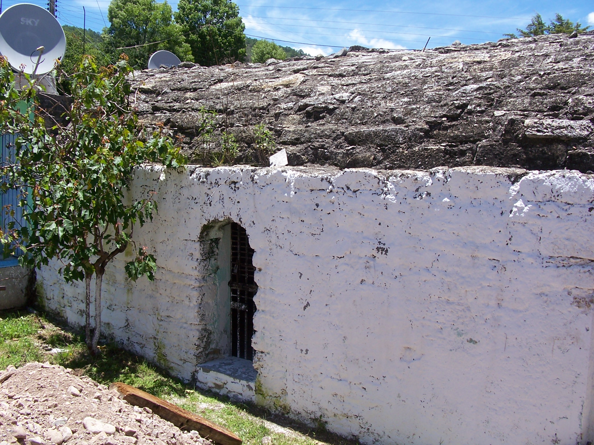 Carcel de San Juan Achiutla, Oaxaca, México